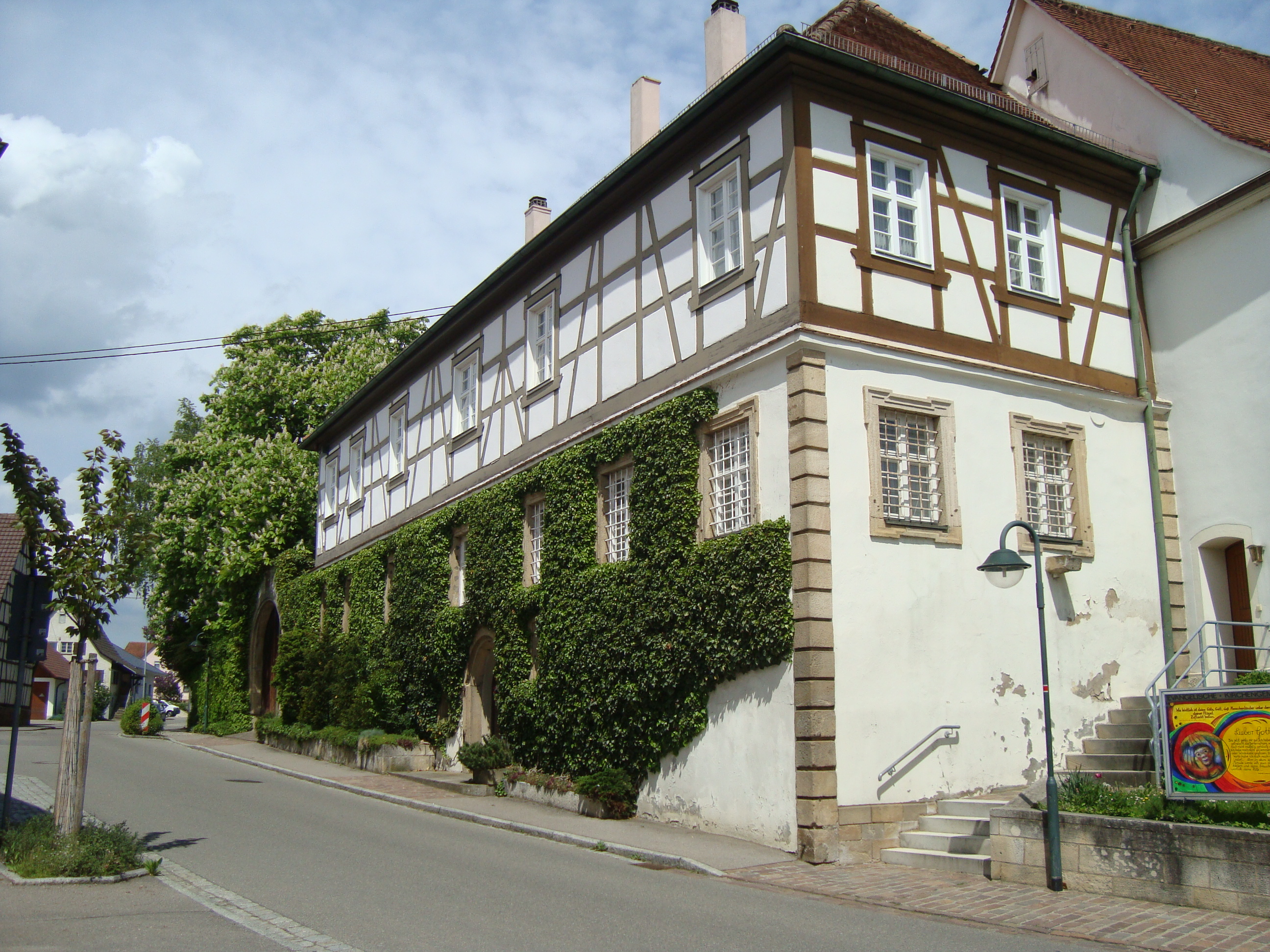 Schloss